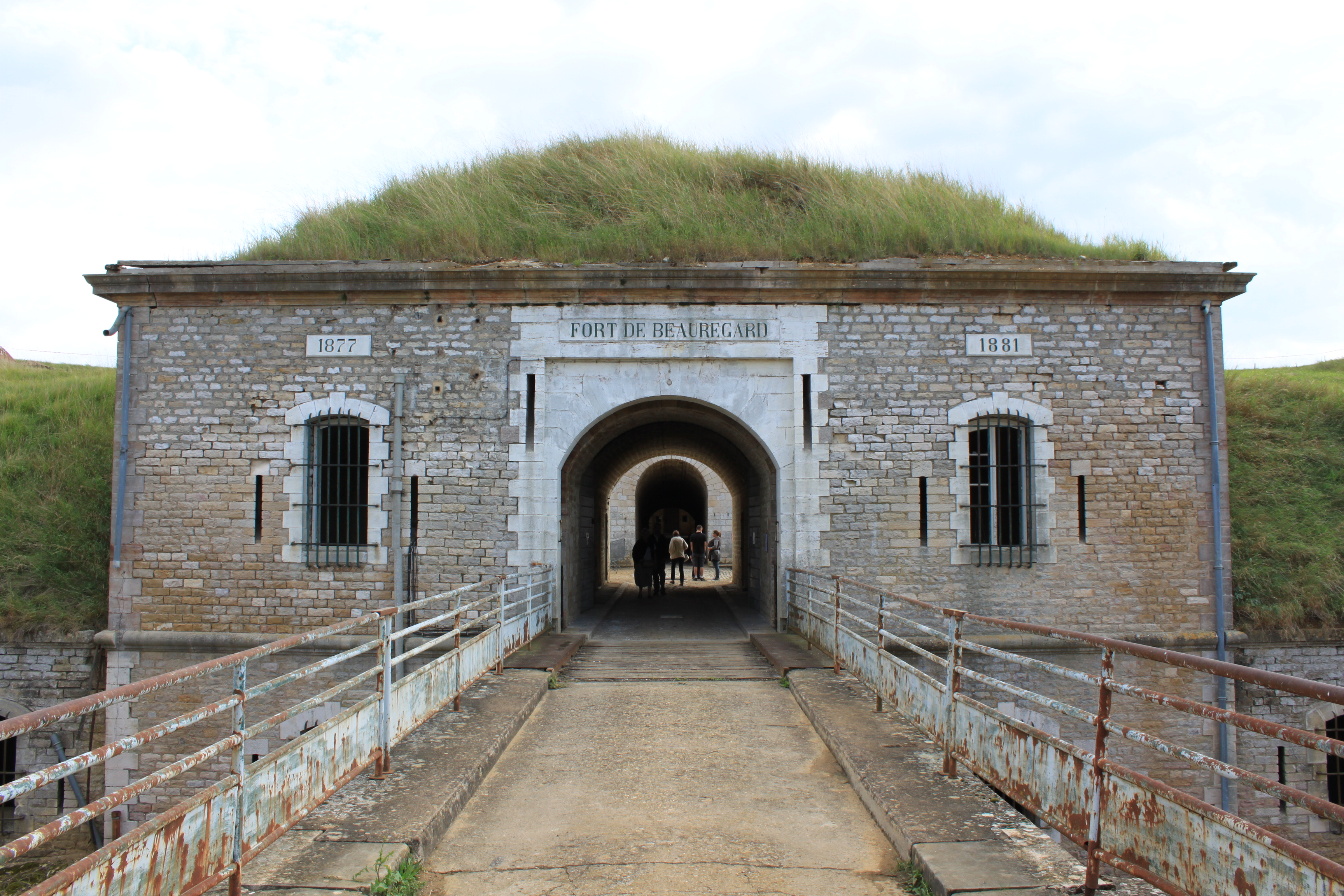 Fort de Beauregard, Fenay, Côte-d'Or, Bourgogne, FRANCE